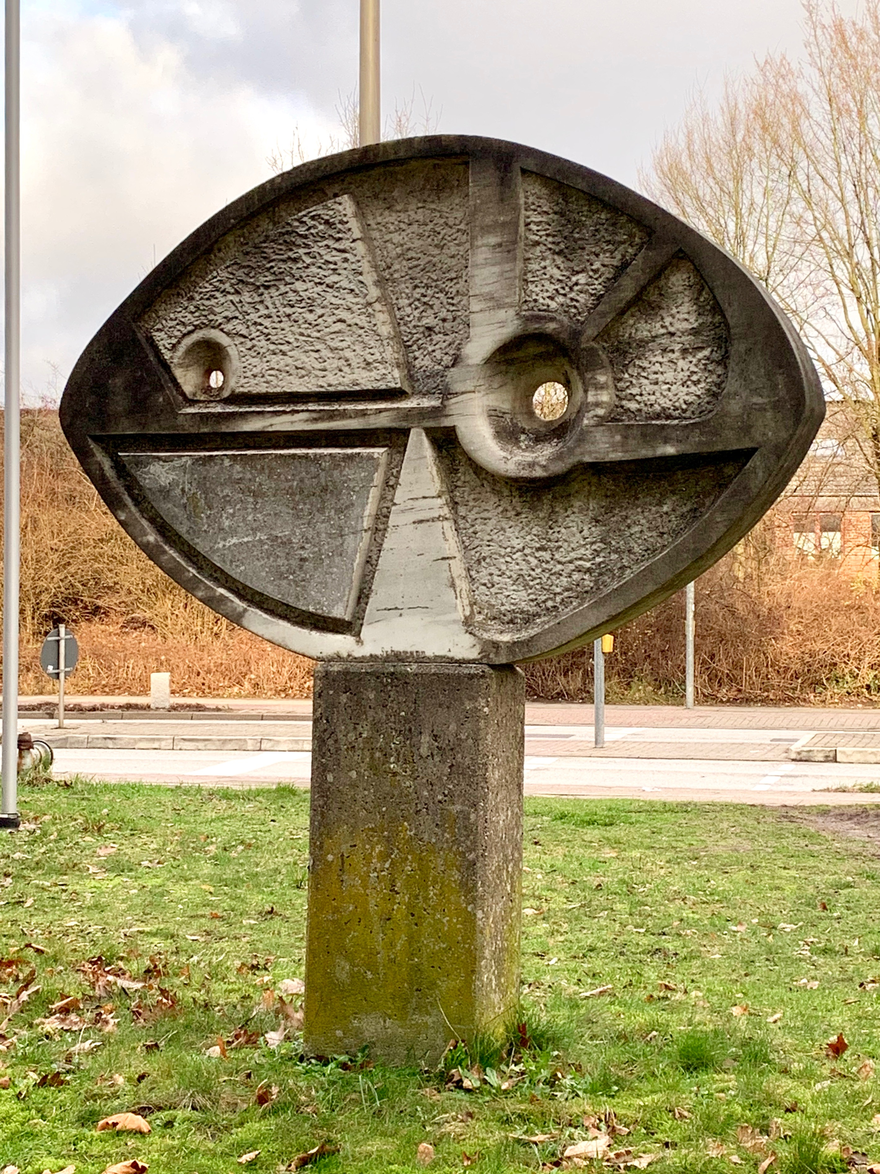 Skulptur "vegetativ-geometrisch" von Pierre Schumann. Marmor aus Carrara (Italien), Internationales Bildhauersymposion 1980, Norderstedt. Standort: Langenharmer Weg 90, Norderstedt